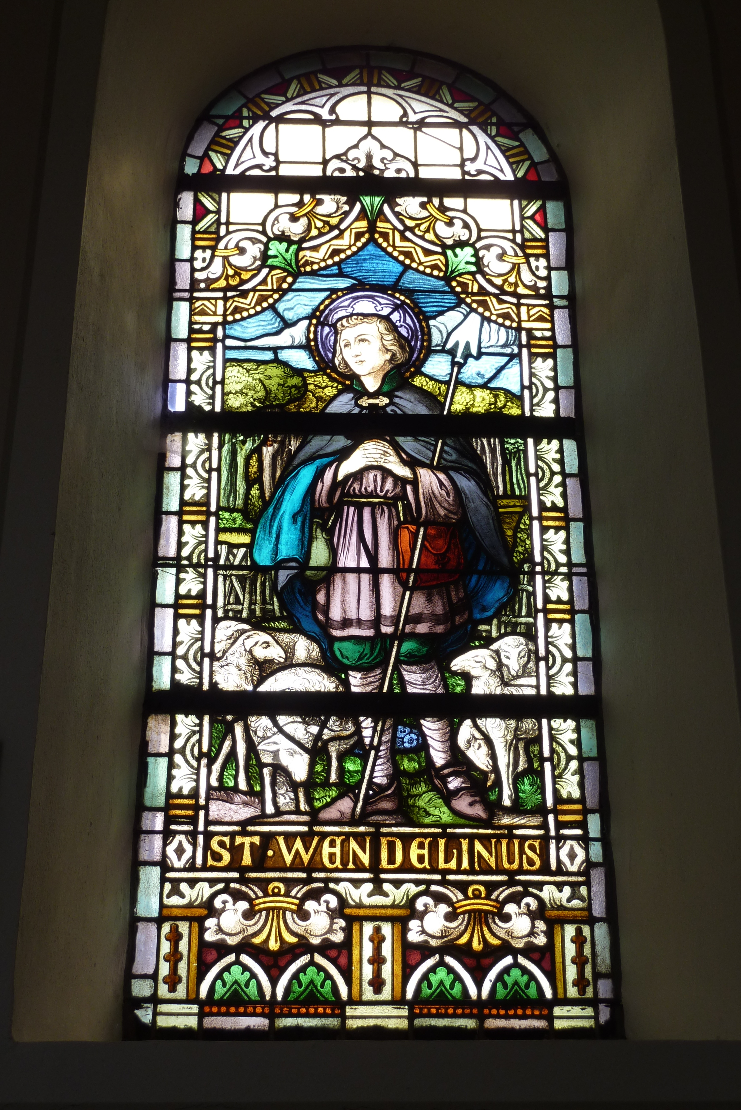 Jammelshofen, Katholische Filialkirche St. Wendalinus, Glasfenster mit Darstellung des hl. Wendelin